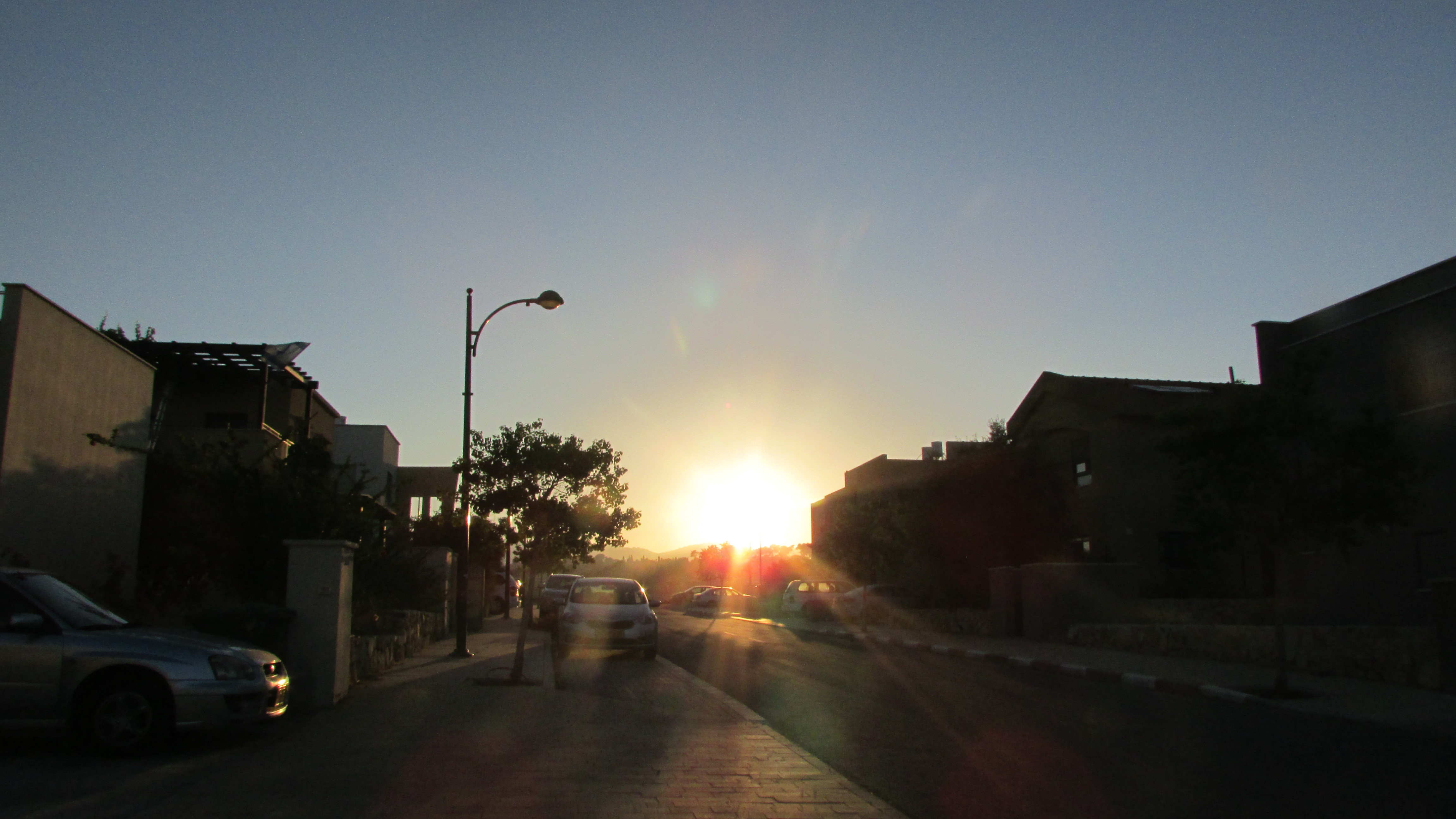 תאורה גבית מכוונת. הצמצם של המצלמה ממוקד באור הבא מן השמש וכתוצאה מכך שאר האובייקטים חשוכים